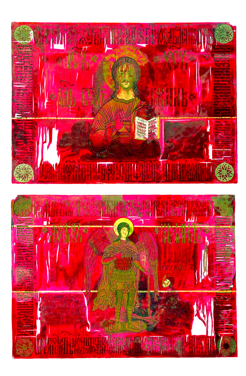 Dmitry Pozaharsky banner Знамя князя Пожарского Изображенное ветхое, шелковой ткани знамя князя Дмитрия Михайловича Пожарского после освобождения им Москвы от поляков и Литвы хранилось в принадлежавшем ему селе Пурих Нижегородской губернии, а в 1827 г. поступило в Оружейную палату. На нем изображен с одной стороны Господь Вседержитель, с другой архангел Михаил и стоящий перед ним на коленях и разувающий сапог Иисус Навин. Вокруг знамени с одной стороны следующая надпись: «С вышних призирая, убогия приемля, посети нас озлобленныя грехи, Владыко всемилостиве; молитвами Богородицы даруй душам нашим велию милость; всякия скверны, всемилостиве Спасе, аз бых делатель, и в отчаянии в ров впадся, но стеню от сердца и вопию к Тебе, Слове, ускори щедрый, потщися на помощь нашу яко милостив». На другой стороне вокруг архангела следующая надпись: «Бысть егда бяше Иисусу у Ерихона и возре очима своими, видя человека стояща пред ним и меч обнажен в руце его, и приступив к нему и рече: наш ли еси, или от сопостат наших? Он же рече ему: аз Архистратиг силы Господня, ныне приидох семо. И паде Иисус поклонился лицем своим на землю и рече ему: Владыко, что повелеваеши Твоему рабу? И рече Архистратиг Господень ко Иисусу: изуй сапог твой с ногу твоею, место бо на нем же стоиши ты, свято есть. И сотвори Иисус тако».